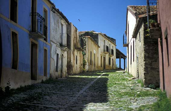 Granadilla